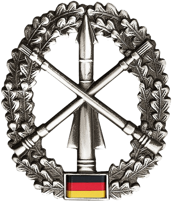 Barettabzeichen der Heeresflugabwehrtruppe der Bundeswehr Barettfarbe: Korallenrot Maße: Hoch: 53mm Breit: 46mm Ausführung: altsilber, Metall